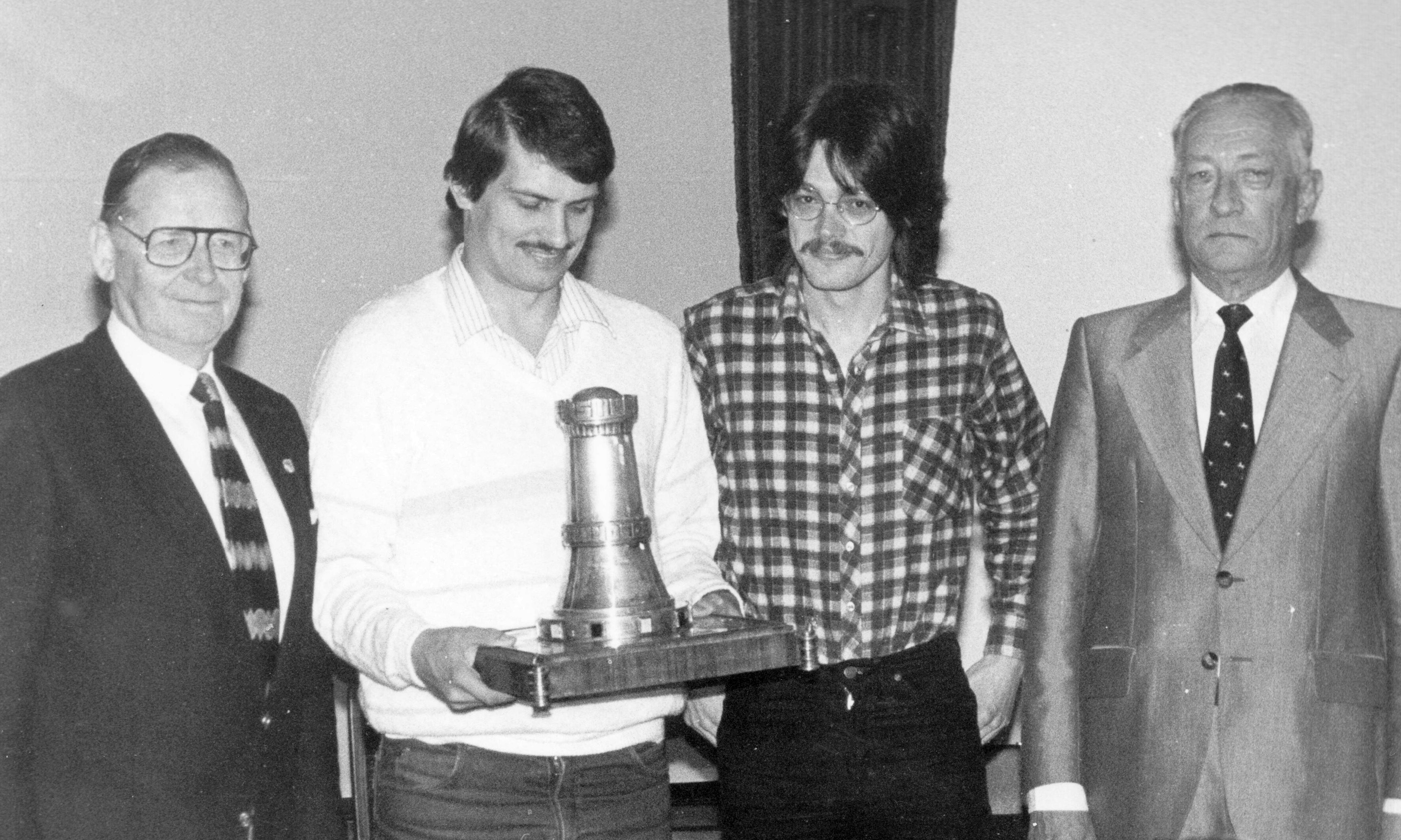 Ehrung des Dähne-Pokal-Siegers. Links Helmut Nöttger (Turnierleiter des DSB), daneben Volkhard Rührig (mit Pokal), rechts Heinz Hohlfeld (Präsident des DSB).